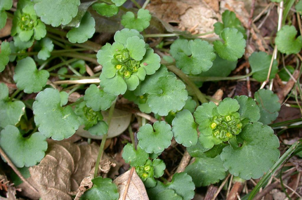 Chrysosplenium japonicum：ヤマネコノメソウ 2003/03/14 和歌山県すさみ町：Susami Town Wakayama pref. japan